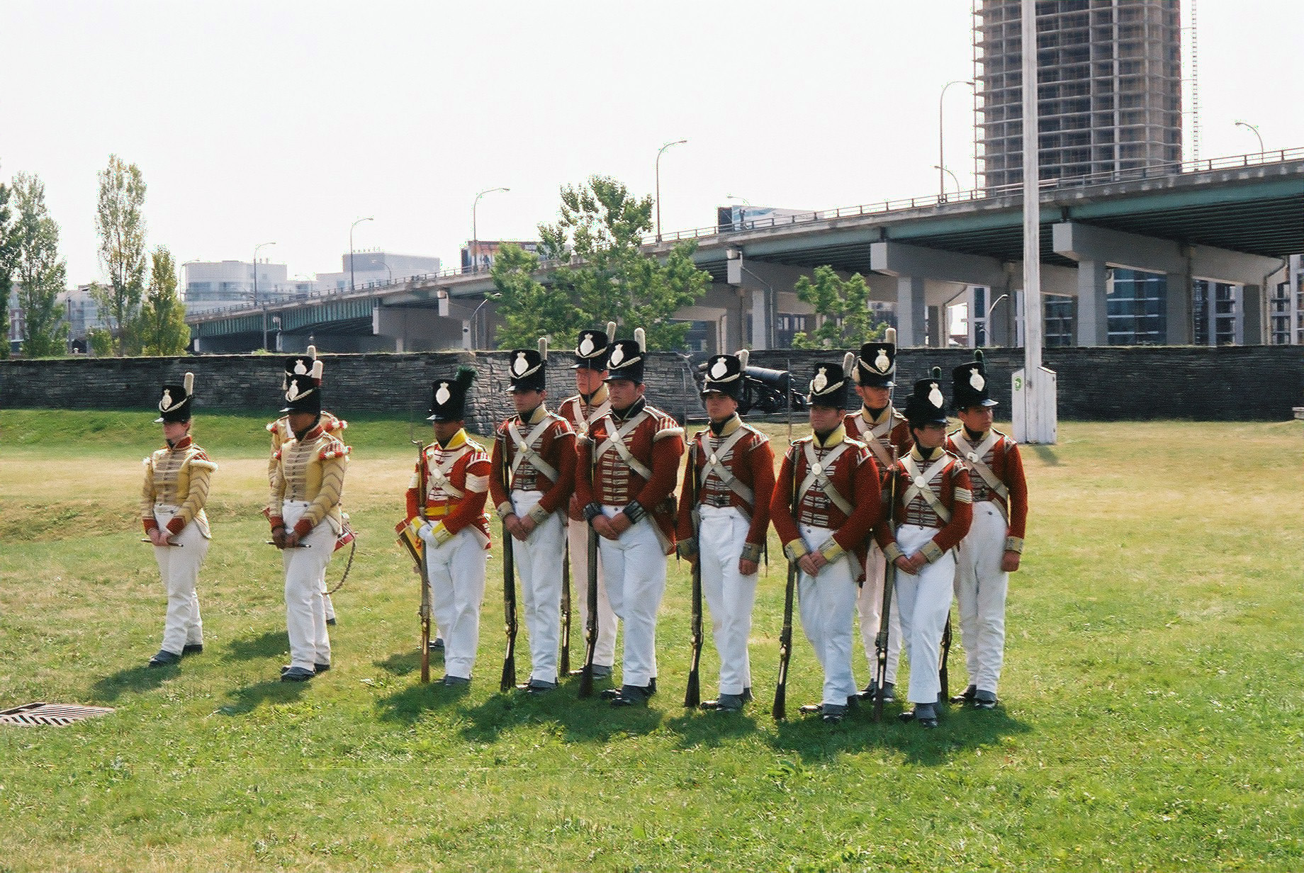 7 Film: Fuji Superia ISO: 400